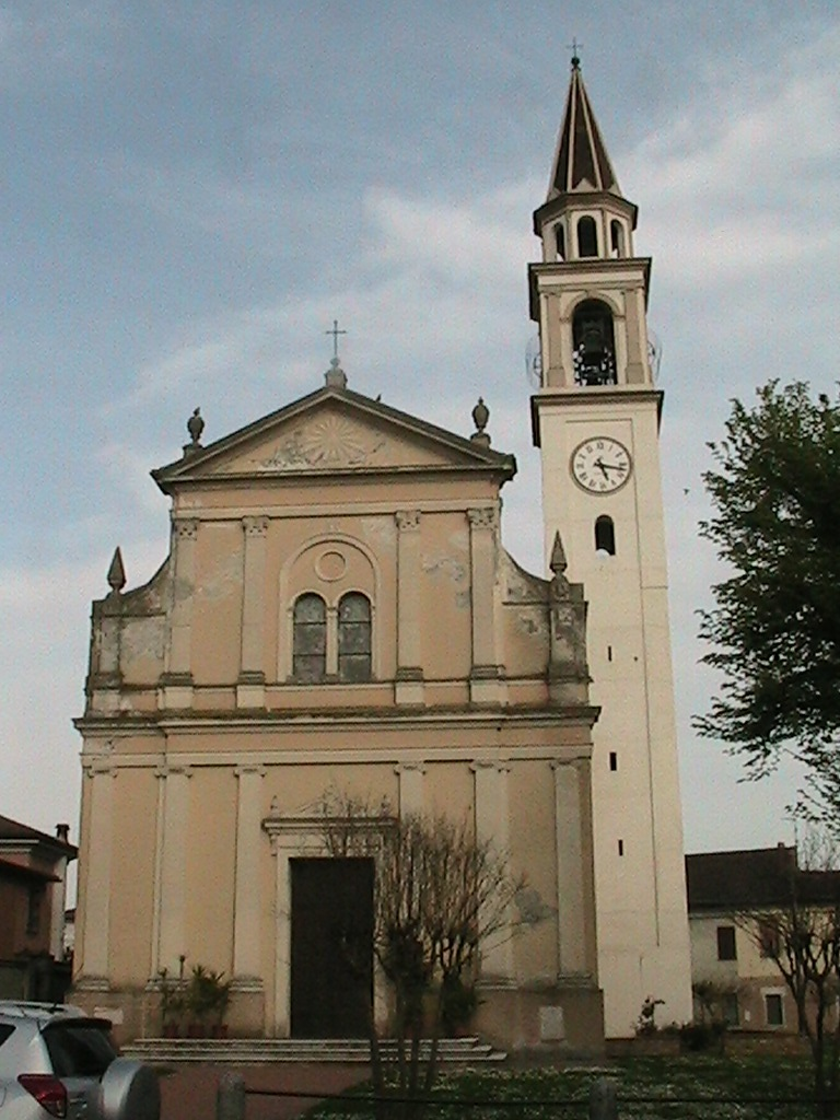 Voltido - Chiesa parrocchiale